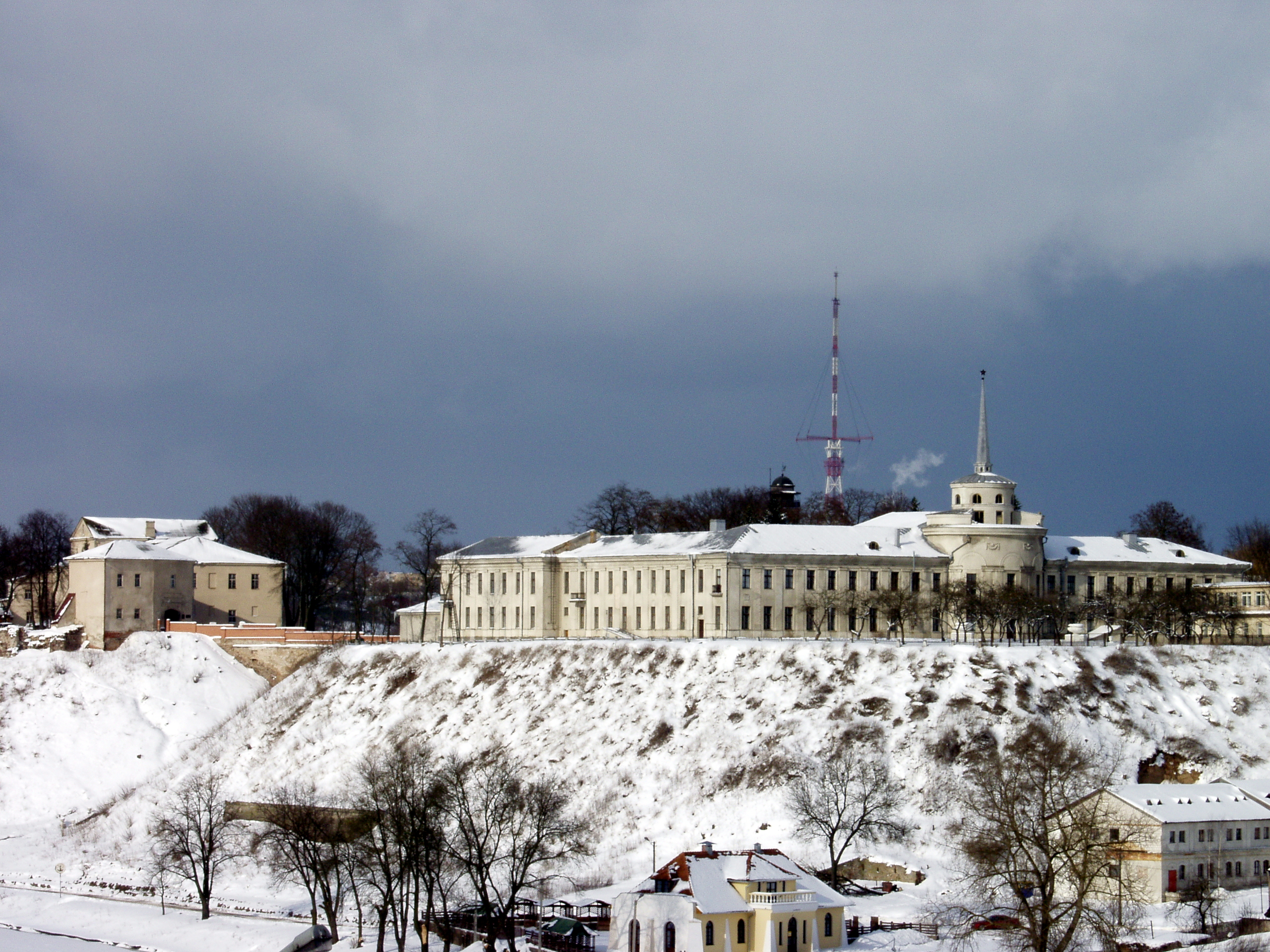 Выгляд гродзенскіх замкаў збоку старога маста праз Нёман